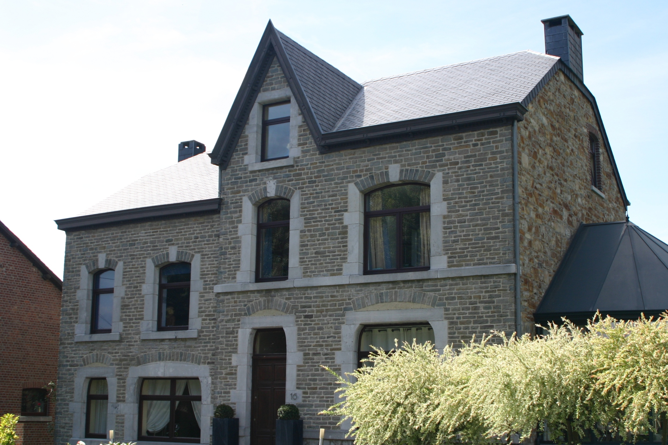 En Haus an der Gemeng Ferrières. Et gesäit een den Afloss vun den zwou Zorte Steng beim Bau. De Giewel ass aus Ardennersteng, d'Fass ass eng Mëschung vu Permangen aus Bloem Steen an Ardennersteng an d'Ënnerzich sinn am bloe Granit. Kategorie:Provënz Léck